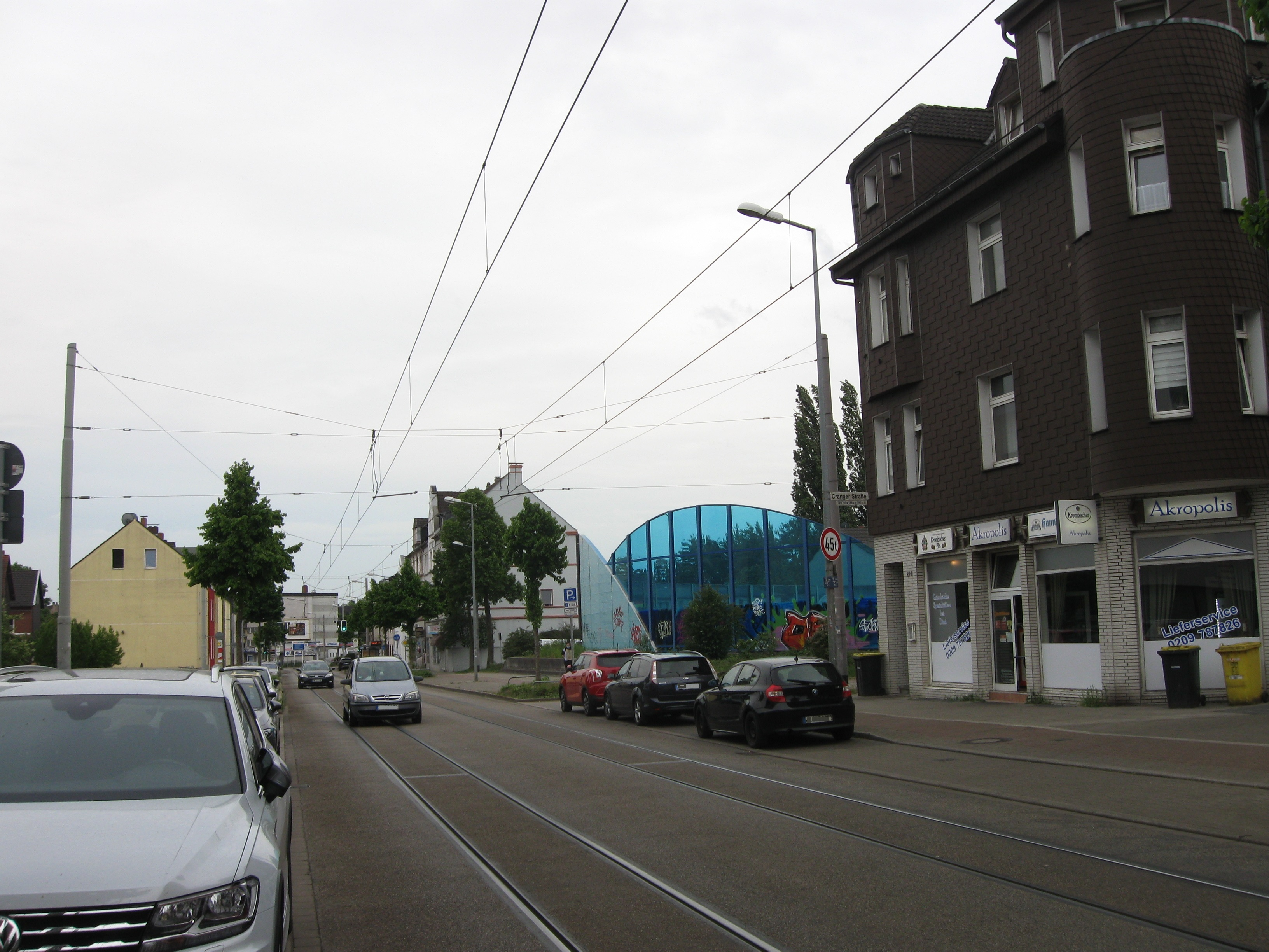 Blick in die Cranger Straße nach Süden an der Einhausung Erle